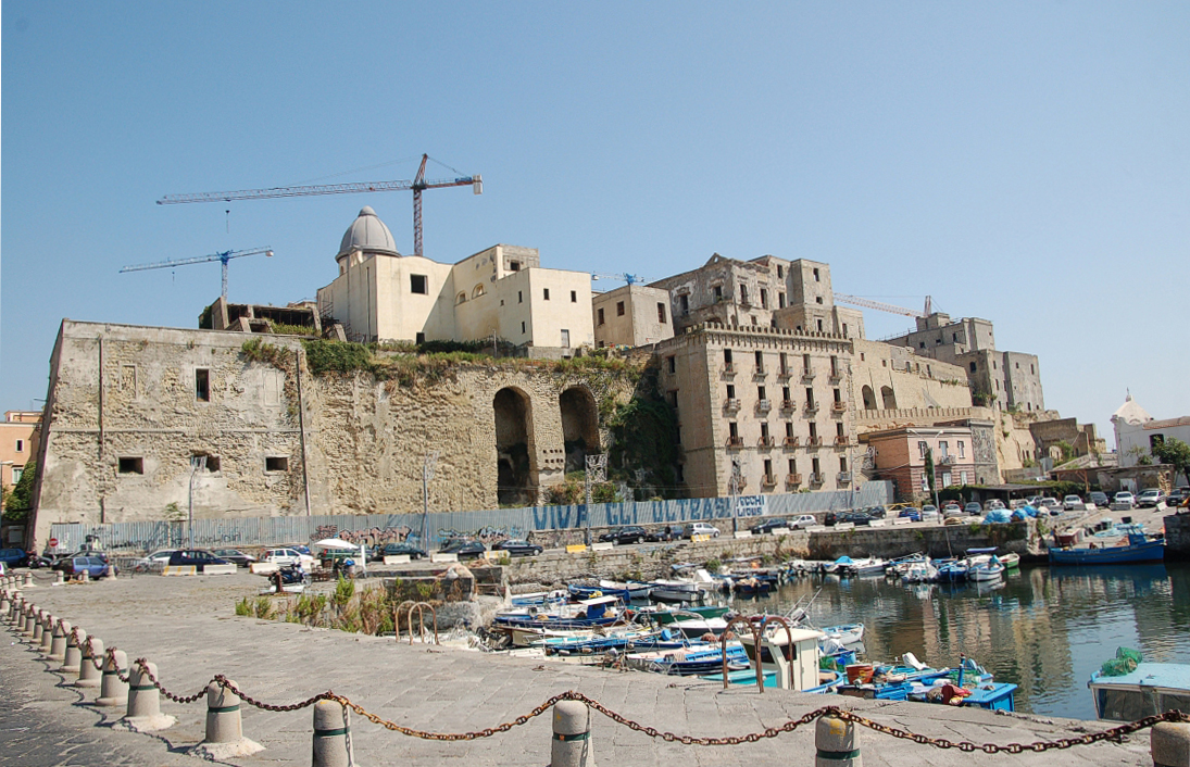 Campi Flegrei